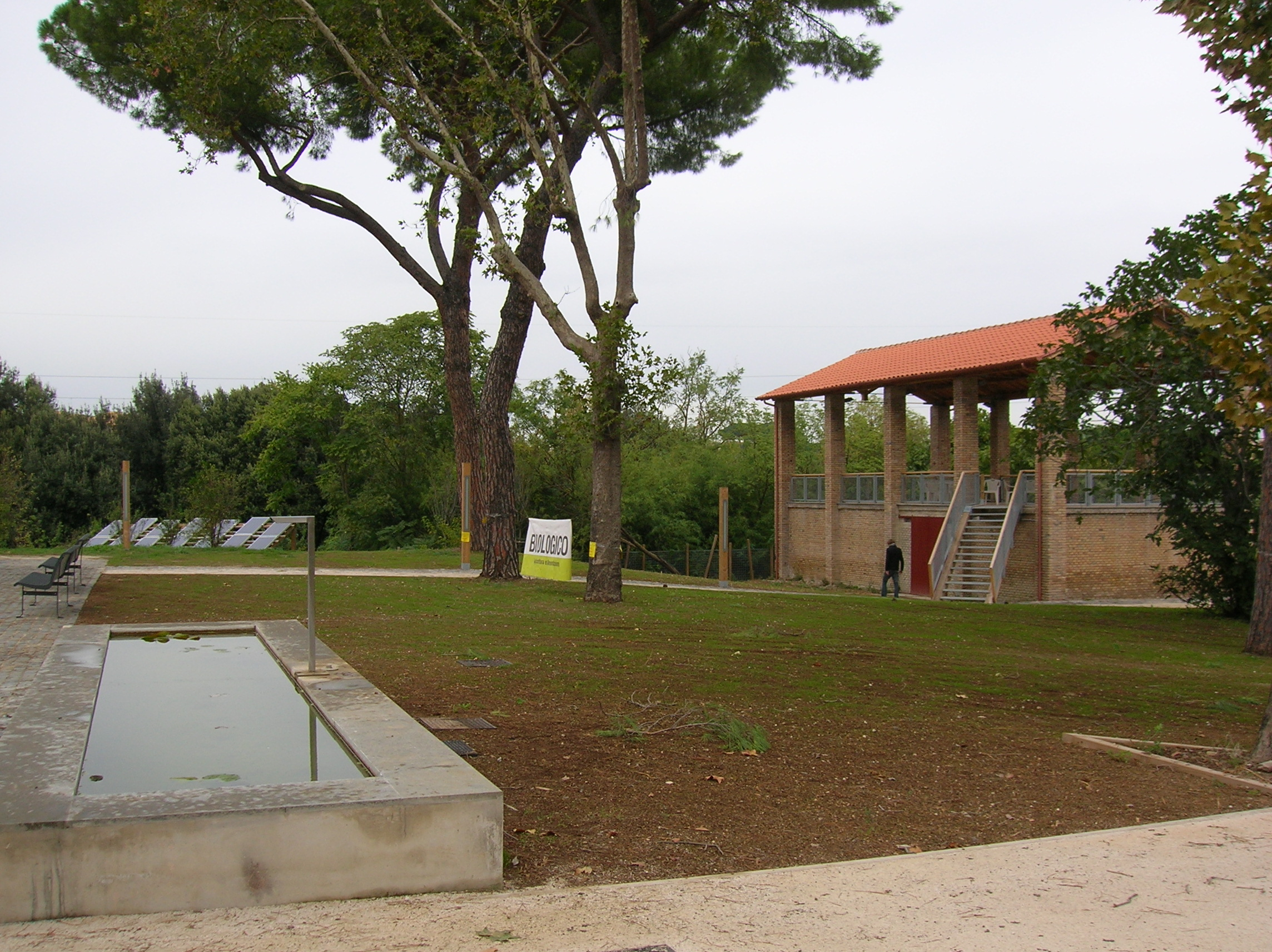 Fienile nel Parco urbano di Aguzzano, Roma, Lazio, Italia.